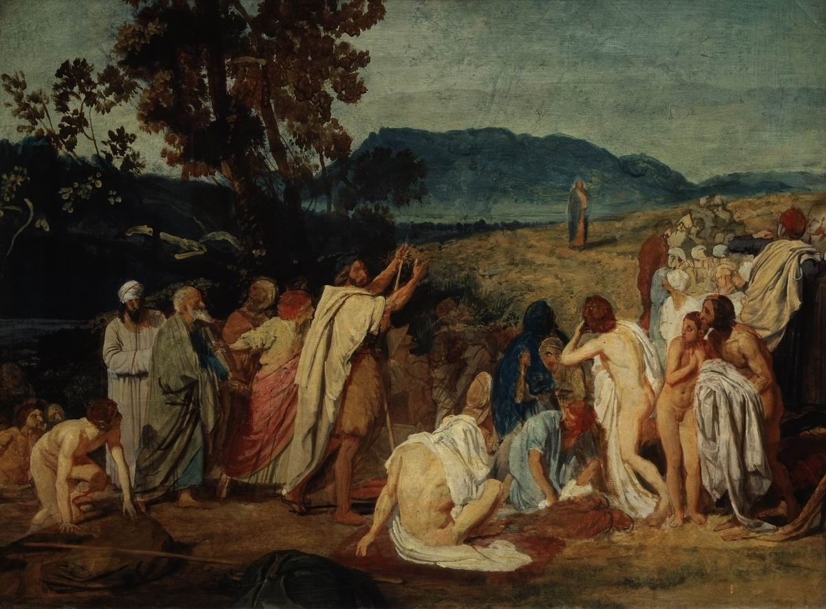 Явление Христа народу. "Венецианский" эскиз